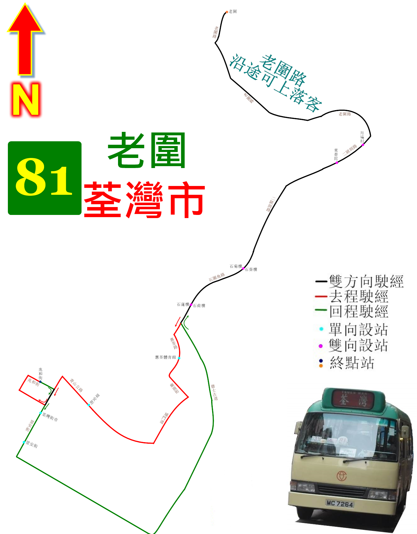 中文（香港）: 新界專線小巴81路的走線圖